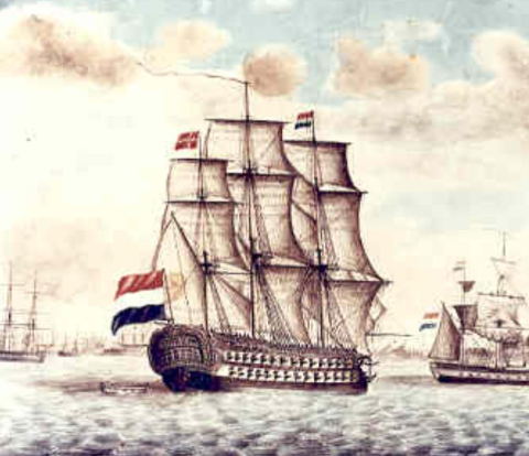 Un navío Holandés de finales del siglo XVIII.